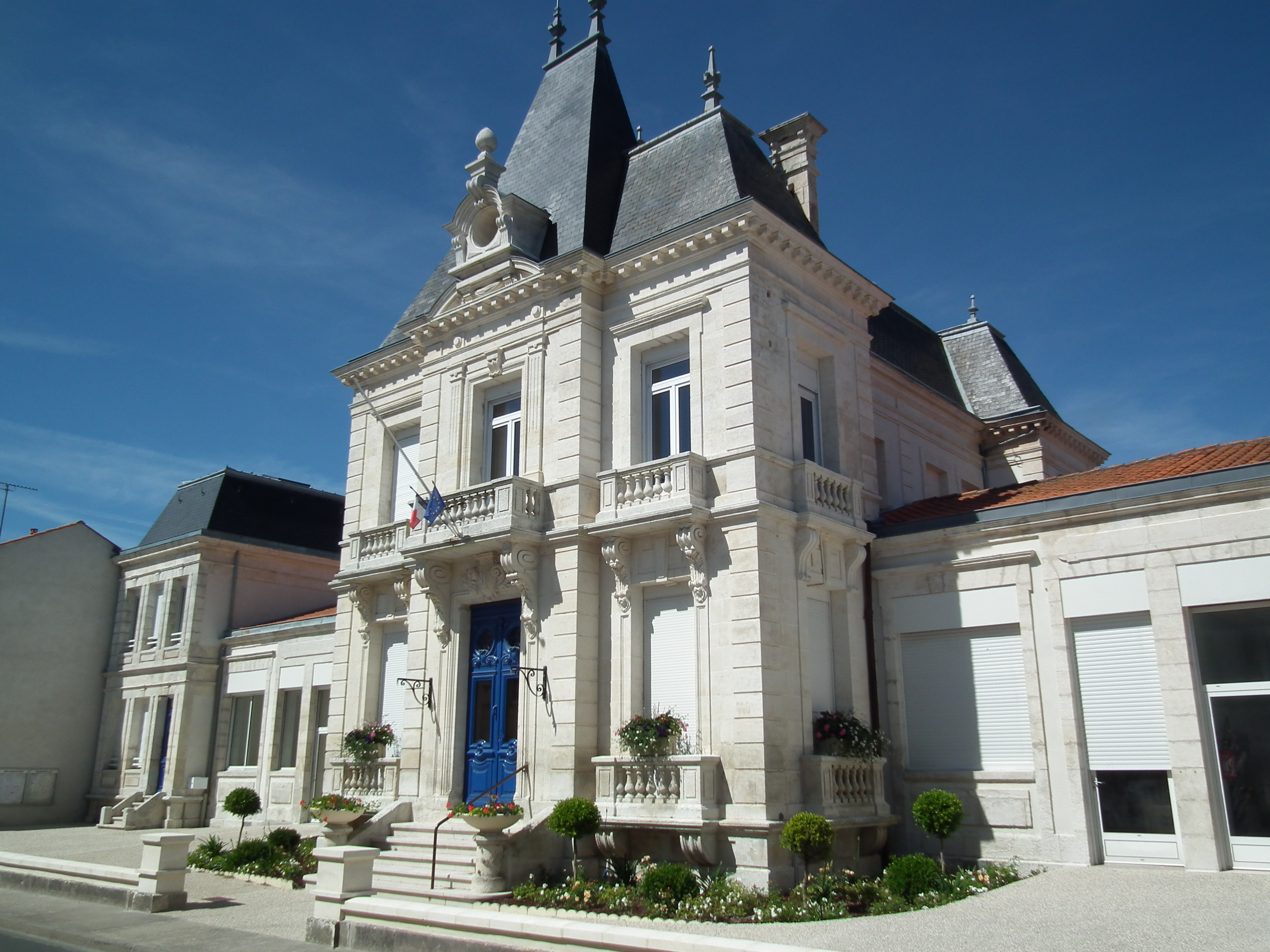 Hôtel de ville d'Etaules